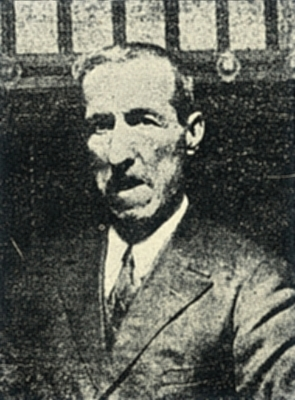 Santiago Lapuente. Cantador, tocador de guitarra y folclorista de jota aragonesa. (1855 - 1933)